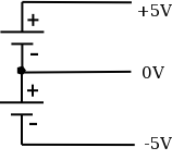 Alimentation symétrique Domaine public Auteur: P.mazeres le 10/10/2004